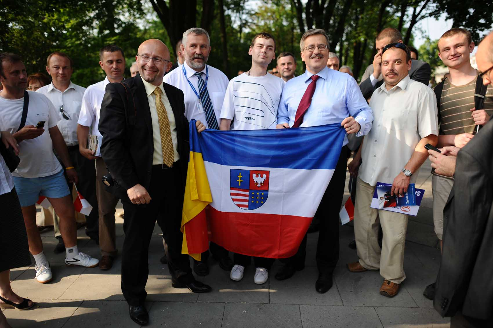 Bronisław Komorowski z flagą województwa świętokrzyskiego w Kielcach, 12.06.2010